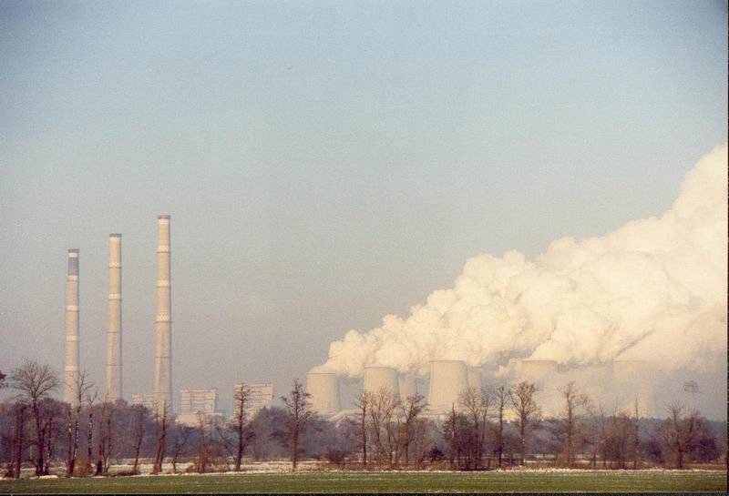 Braunkohlekraftwerk Jänschwalde